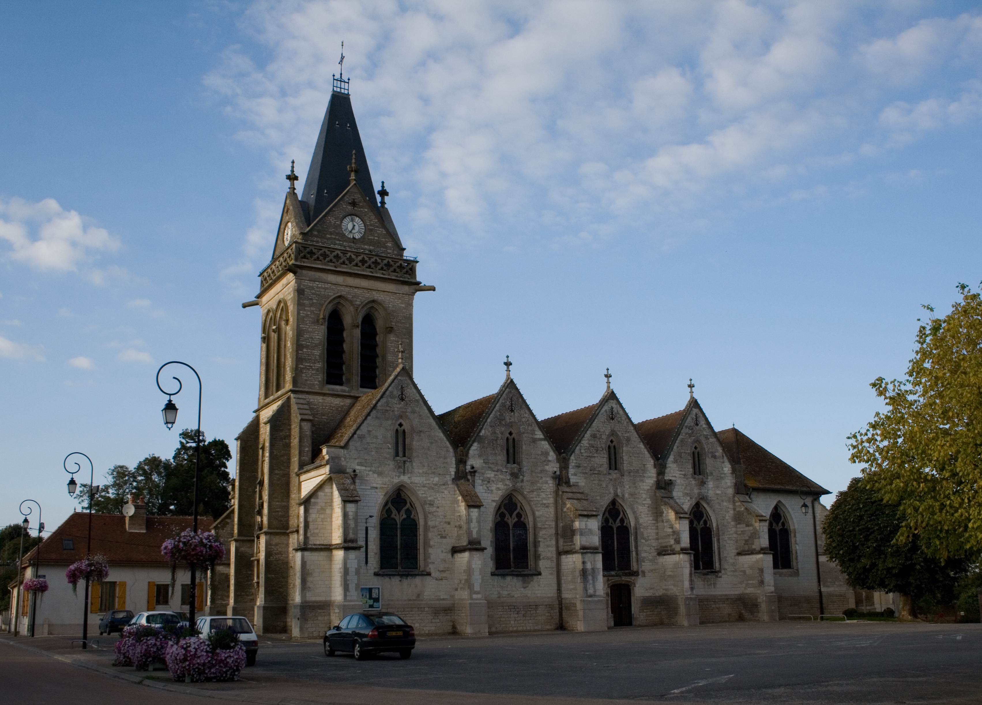 Eglise de Lusigny-sur-Barse